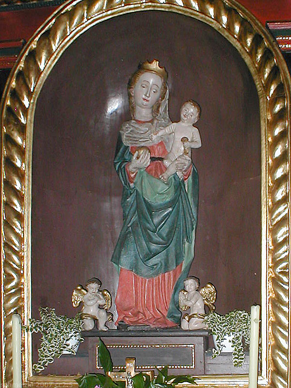 Madonna aus der Kirche St. Mauritius in Hemsbach